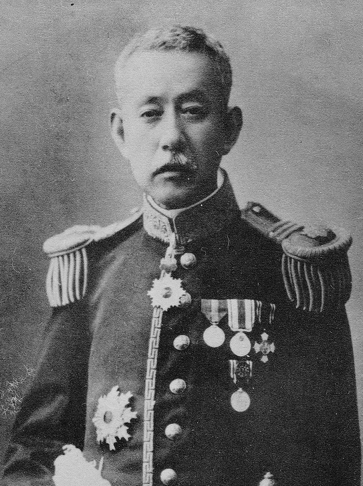 毛利元昭の肖像